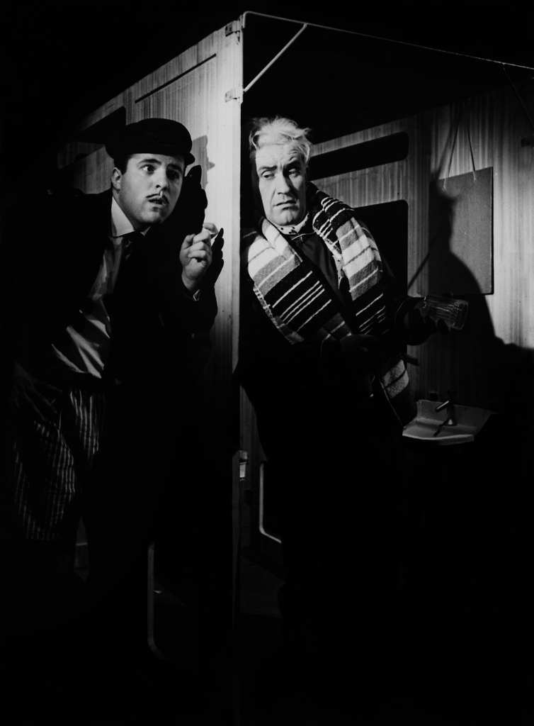 Dario Fo, Arhangeli niso avtomati, Drama SNG v Ljubljani. Na fotografiji: Janez Hočevar (Antonio) in Jurij Souček (Slaščičar).